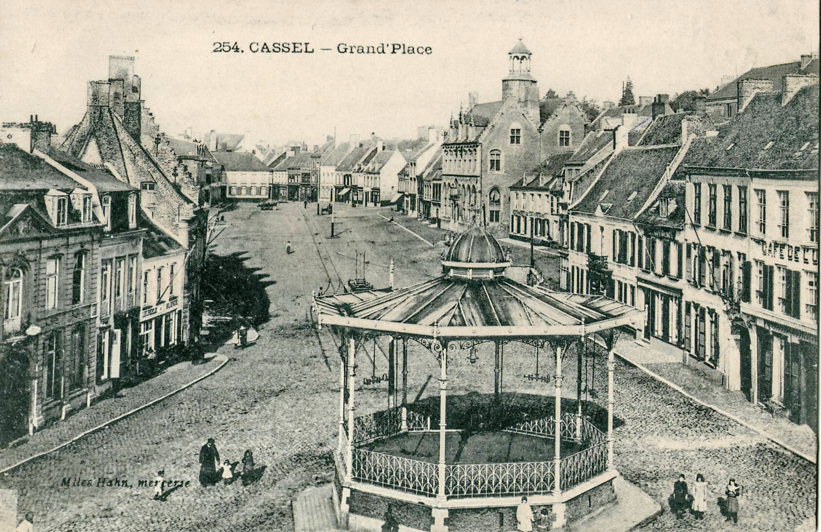 Carte postale ancienne éditée par Mlles Hahn, mercerie, n°254 :Cassel - Grand Place